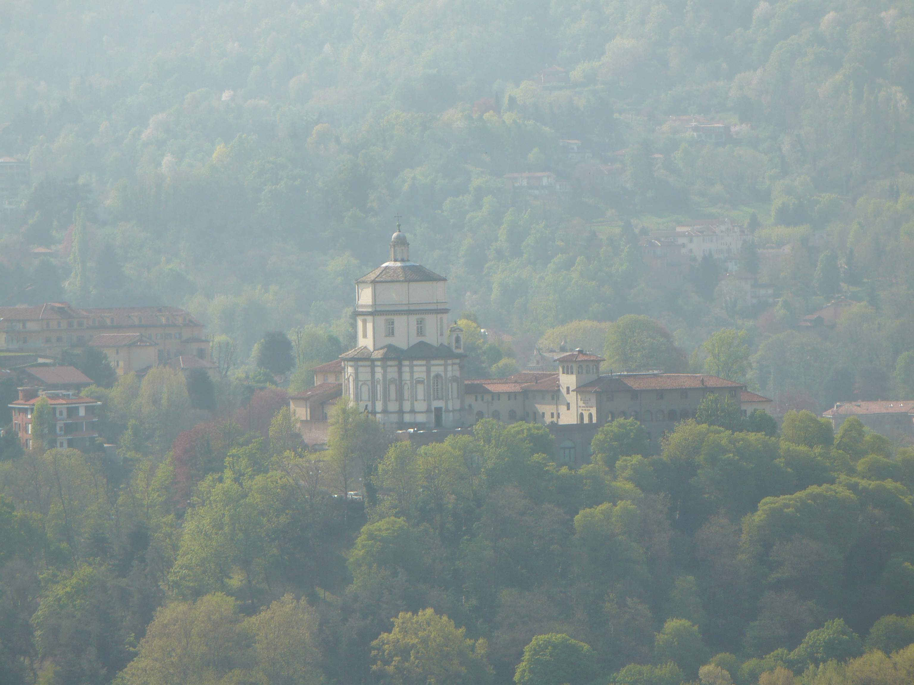 Il Monte dei Cappuccini visto dalla Mole Antonelliana - Torino - Italia